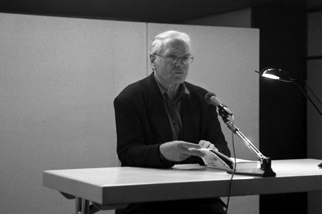 Martin Walser während einer Lesung in Planegg (Bayern) im September 1992